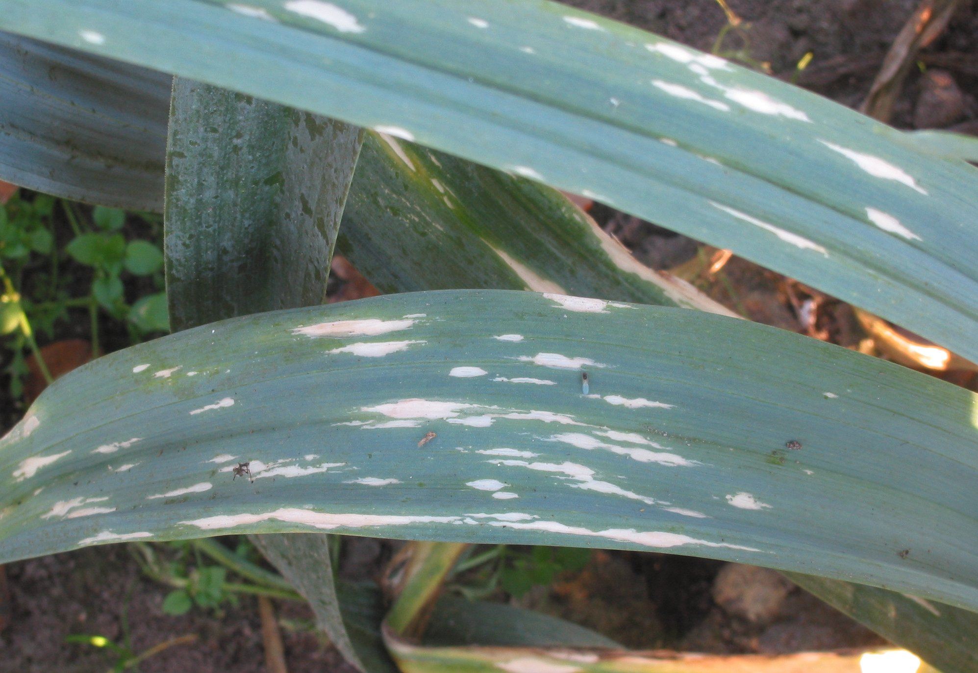 Prei gevolg van inteelt) Inbreeding damage on Allium porrum